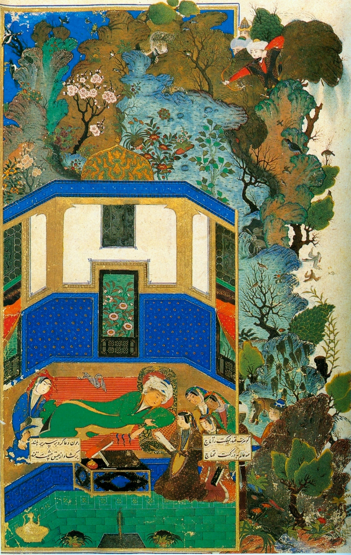 Шейхи. Бахрам Гур в Зеленом павильоне. Миниатюра. Хамсе,Низами. 1480е гг. Топкапы Сарай, Стамбул.